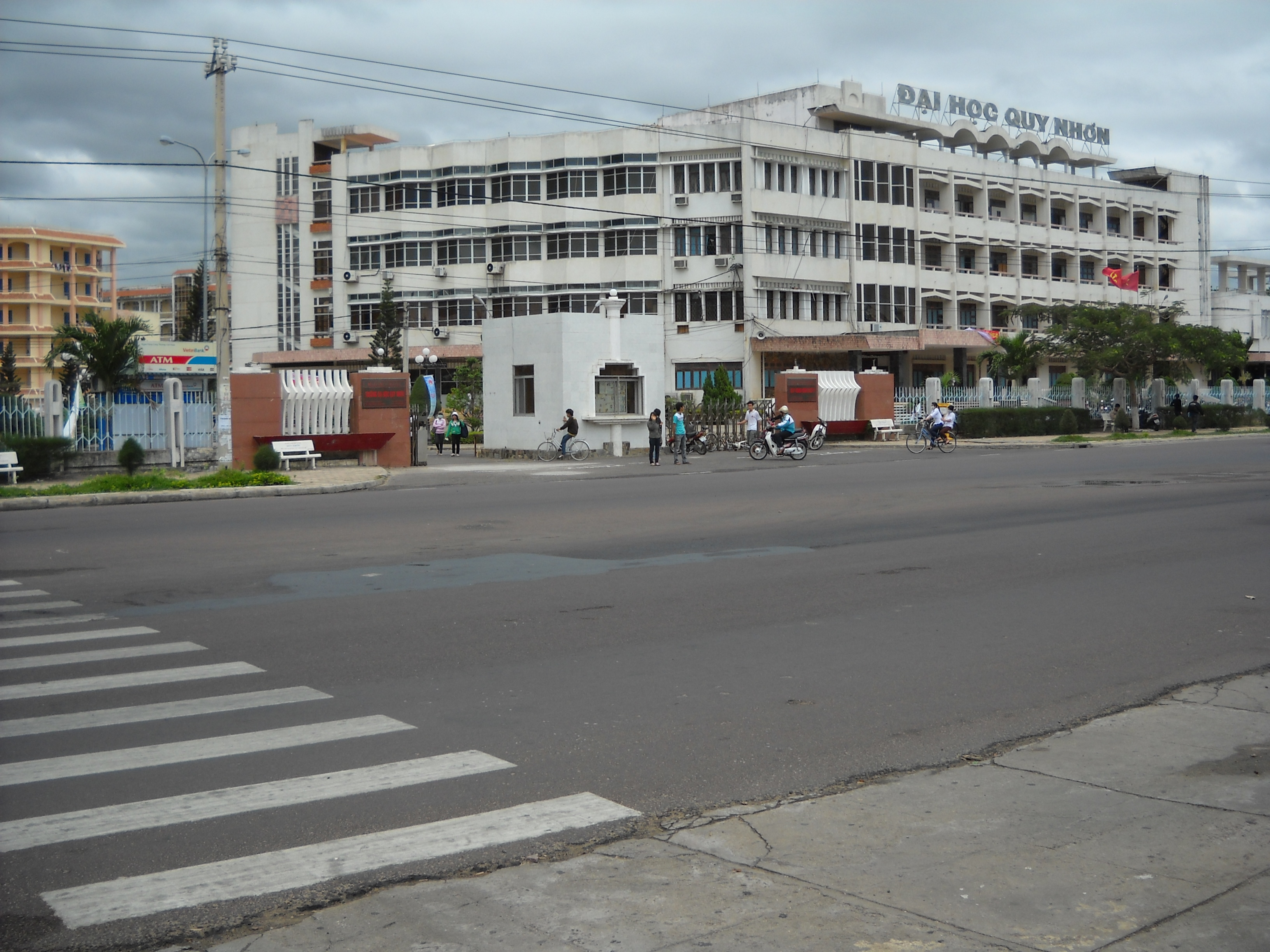 Đại học Quy Nhơn